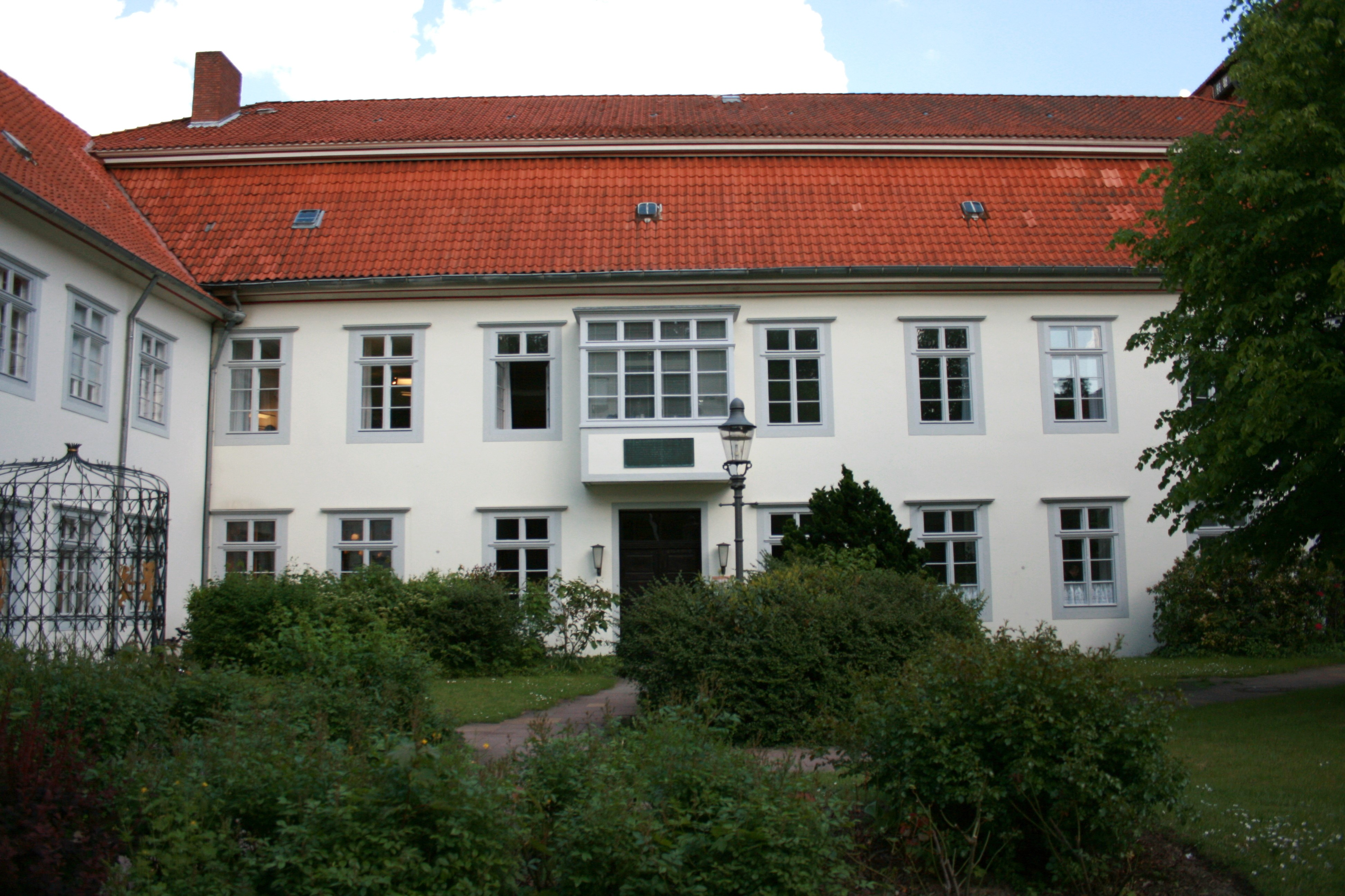 Kreisverwaltung Landkreis Lüneburg, Auf dem Michaeliskloster in Lüneburg